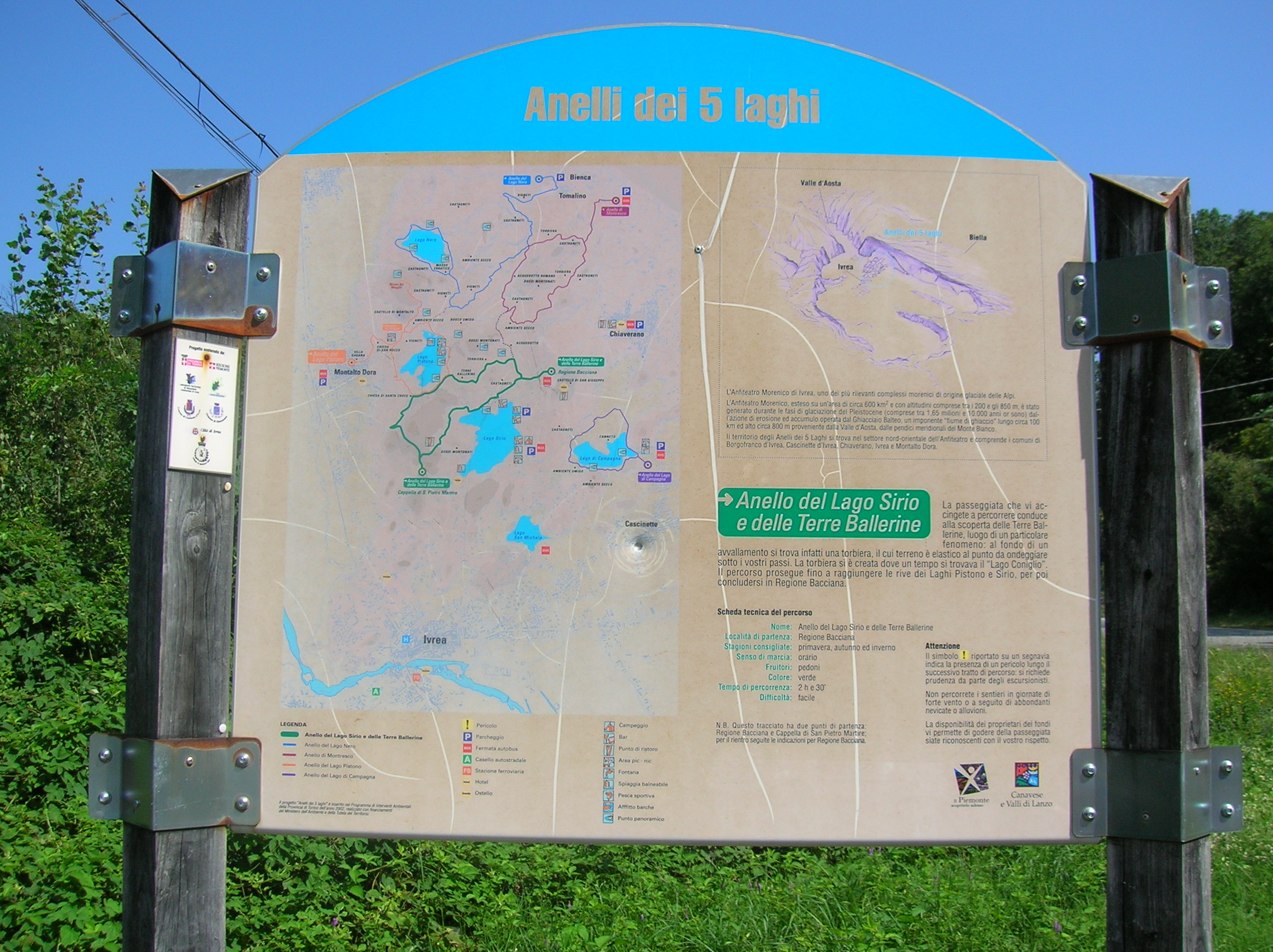 Cartello Anelli dei 5 laghi - Anello del lago Siro e delle terre ballerine.